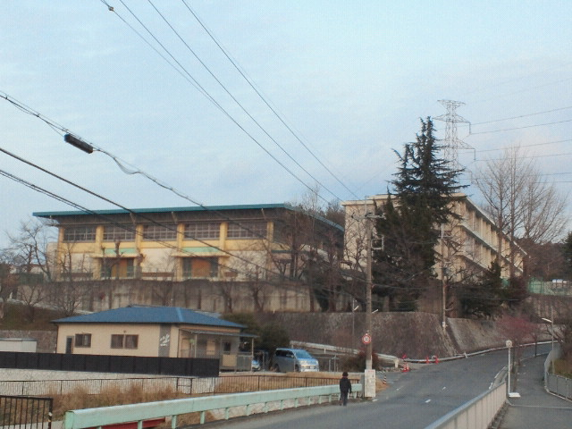 近景（アクセス道路上）